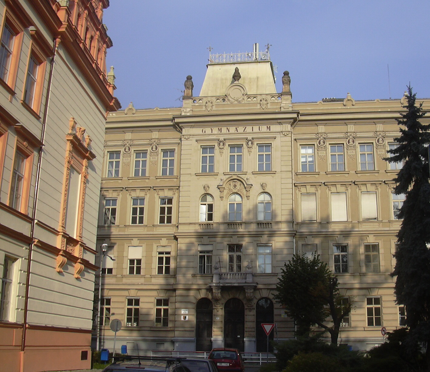 Gymnázium J. Wolkera v Prostějově (Czech Republic)